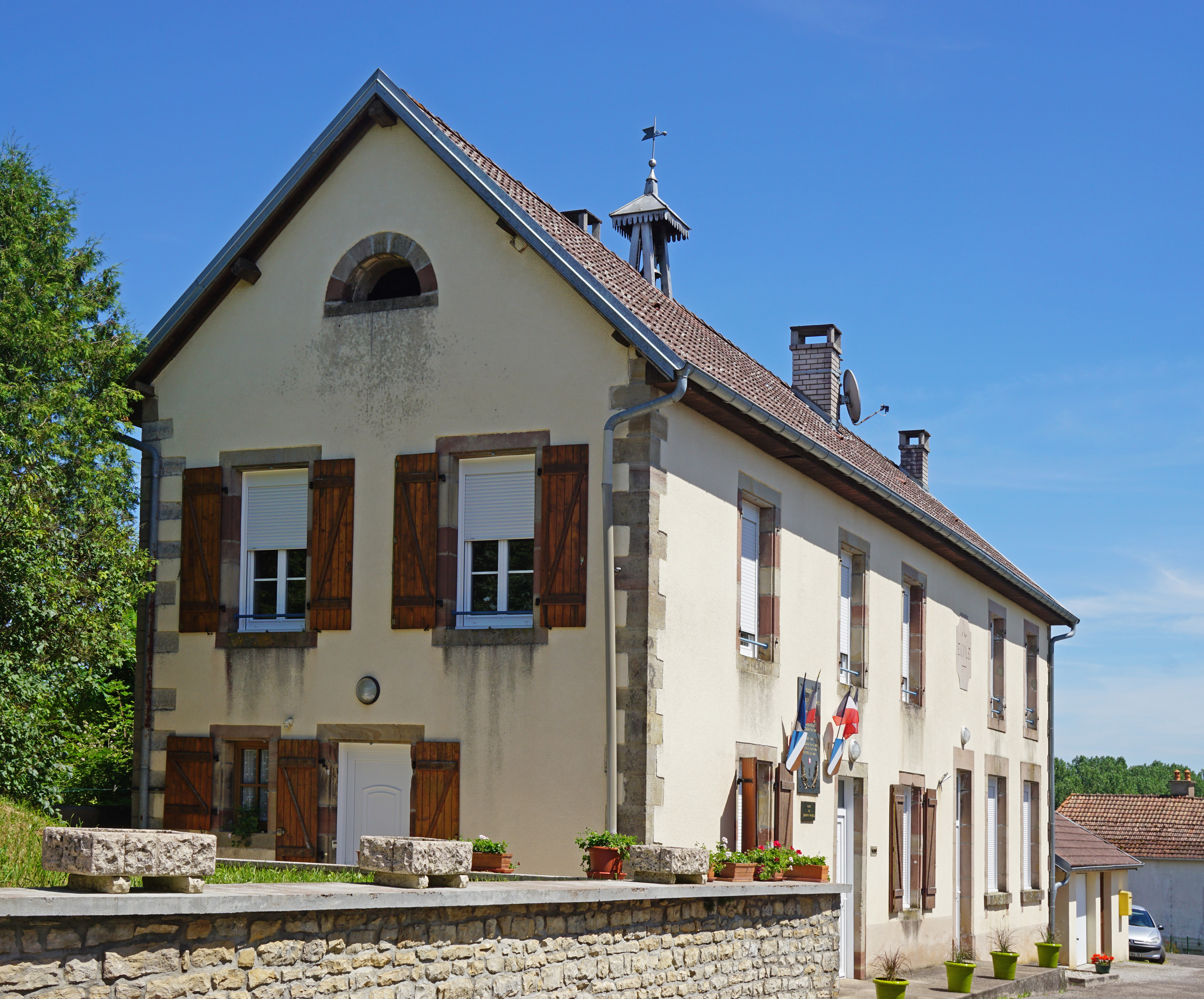 Mairie d'Autrey-le-Vay.